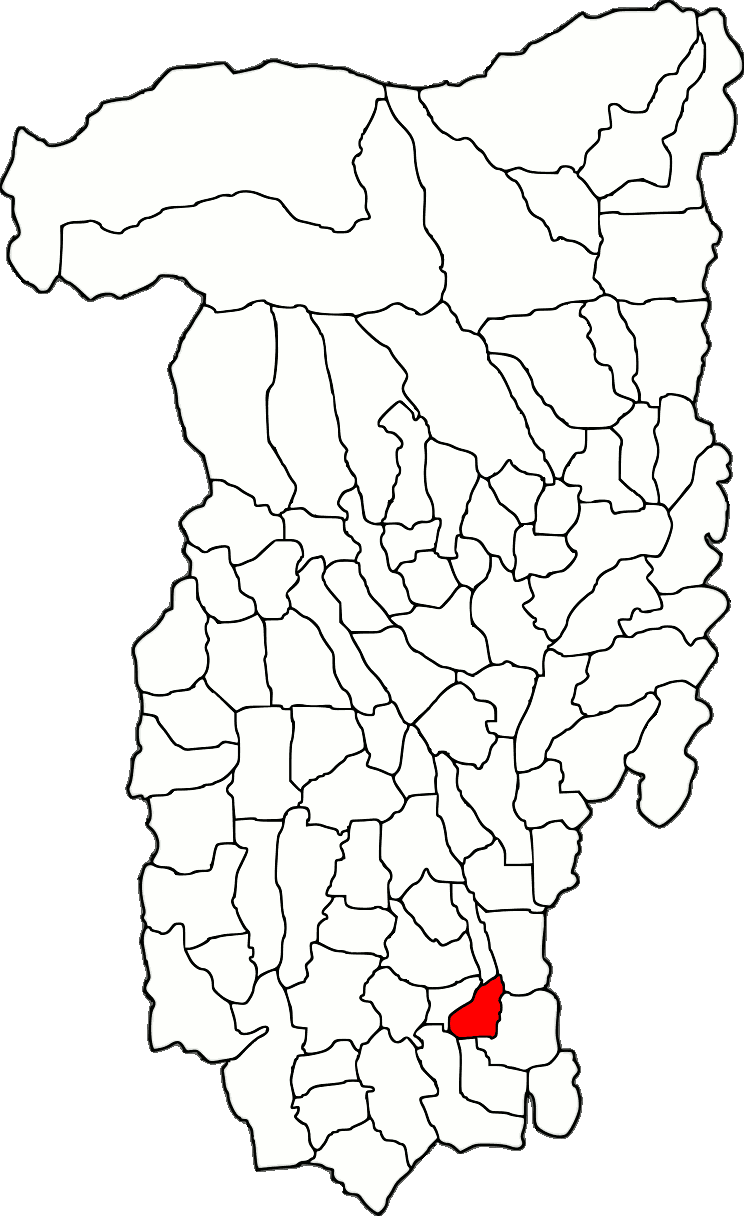 Lage der Gemeinde Sutești im Kreis Vâlcea (RO).